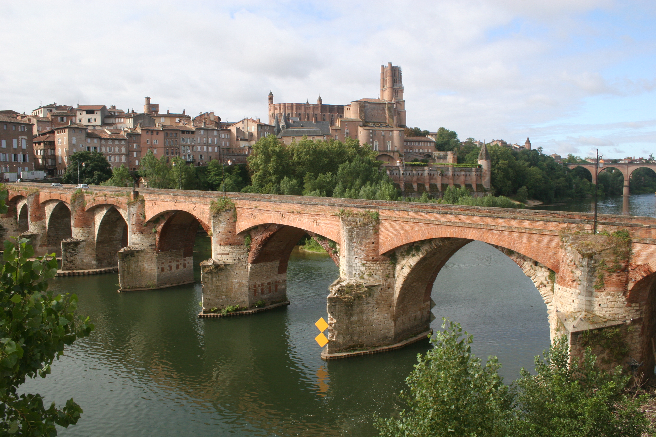 Le Pont Vieux franchit le Tarn à Albi depuis 1035